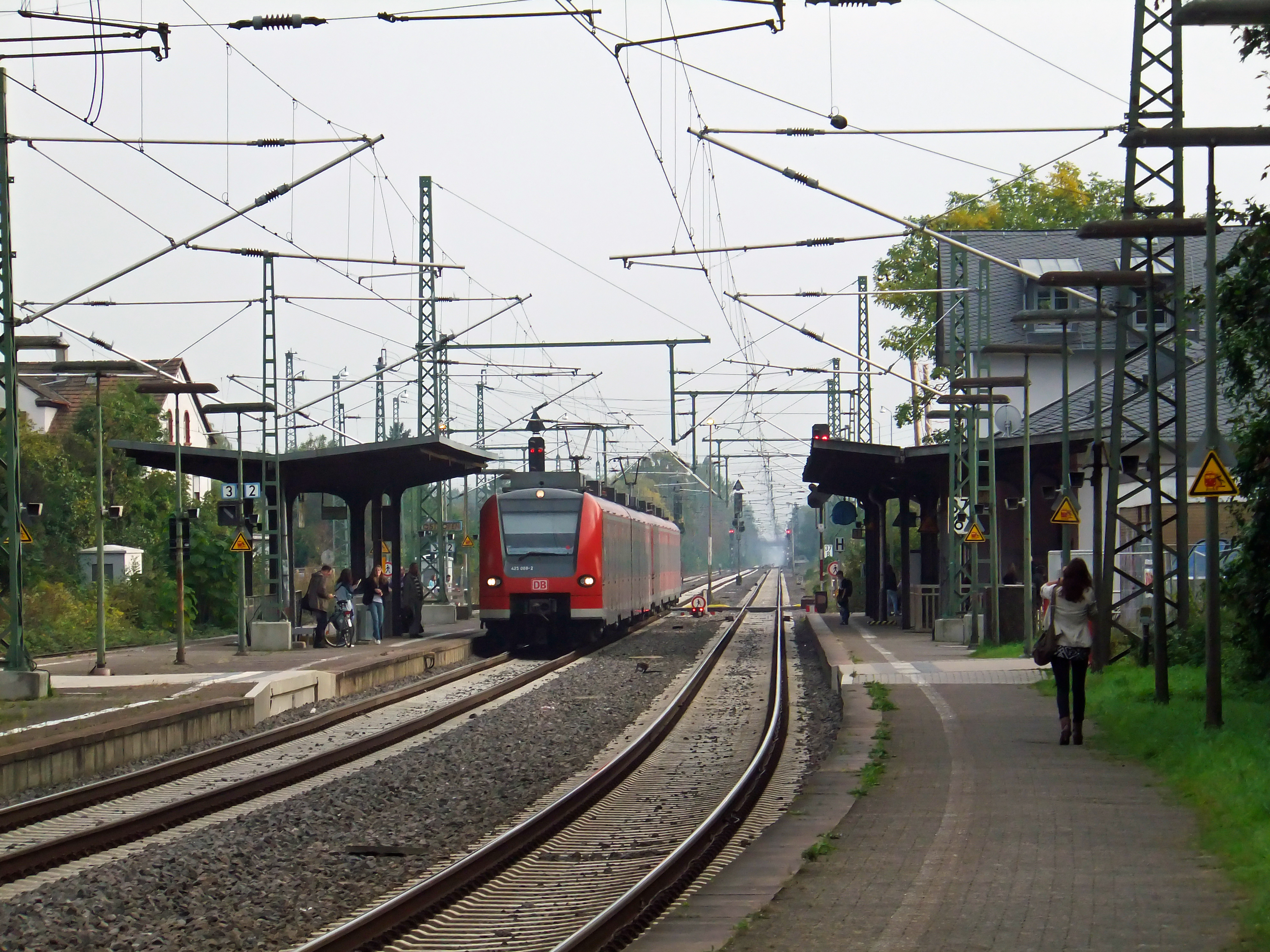 Der Bahnhof von Osthofen vor seiner Modernisierung für die Einführung der S-Bahn RheinNeckar auf der Bahnstrecke zwischen Mainz und dem Hauptbahnhof von Ludwigshafen am Rhein, bei der der Bahnhof unter anderem höhere Bahnsteige und durch Aufzüge einen barrierefreien Ausbau erhielt